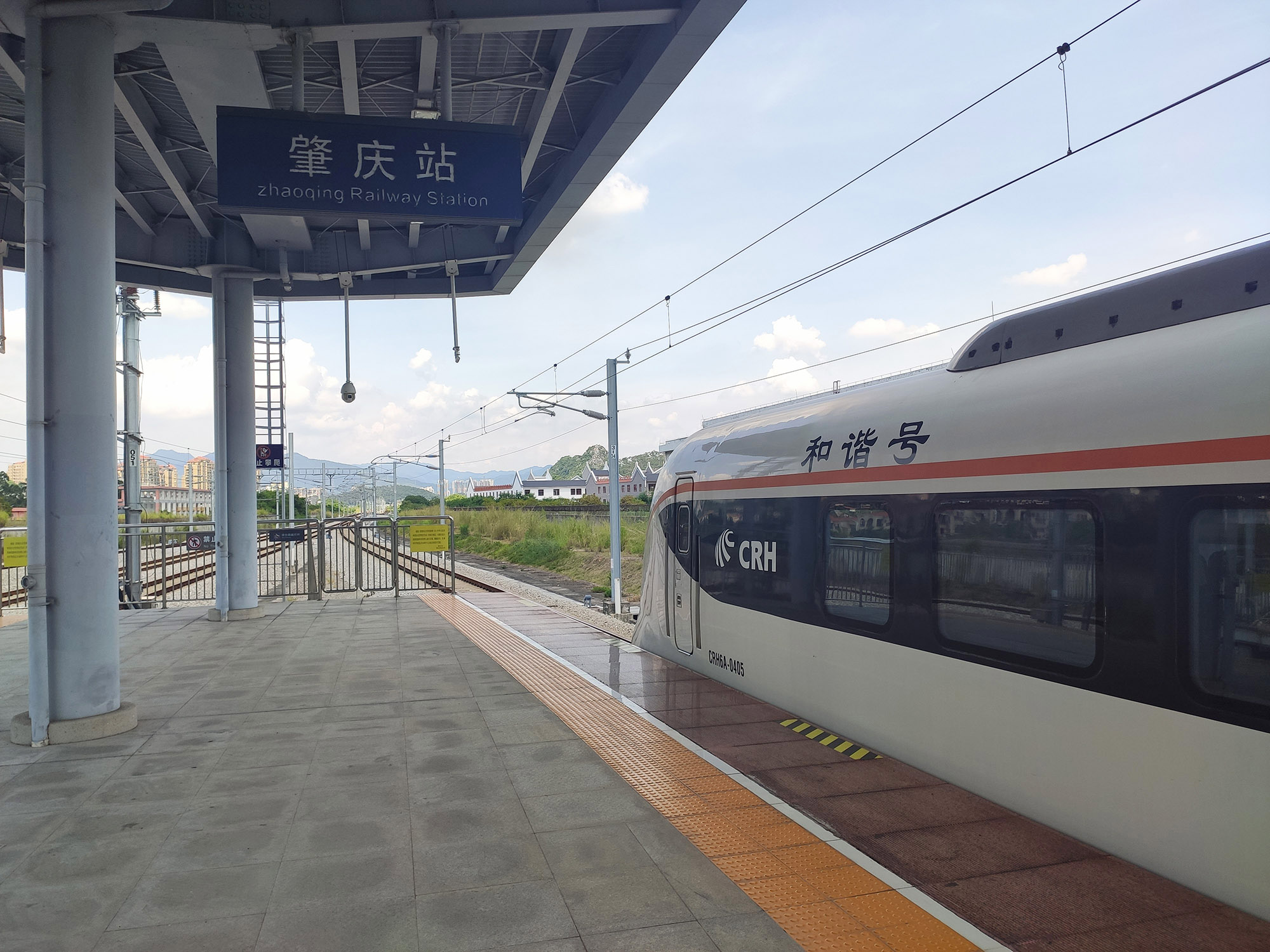 中文（中国大陆）: 肇庆站广佛肇城际站台